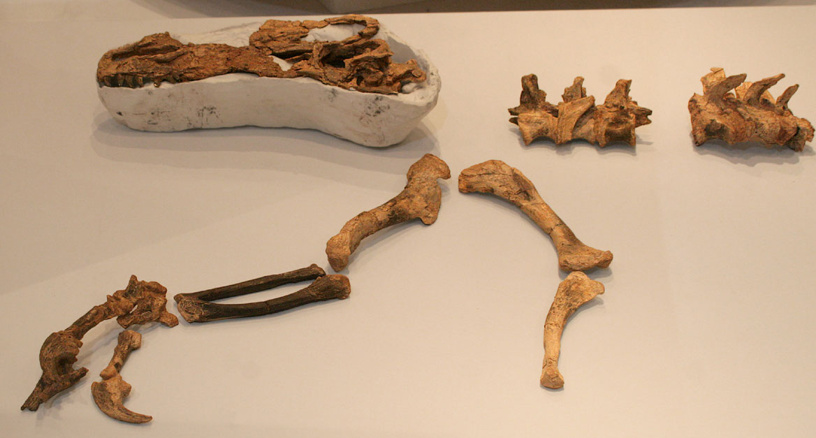 Guanlong - 02